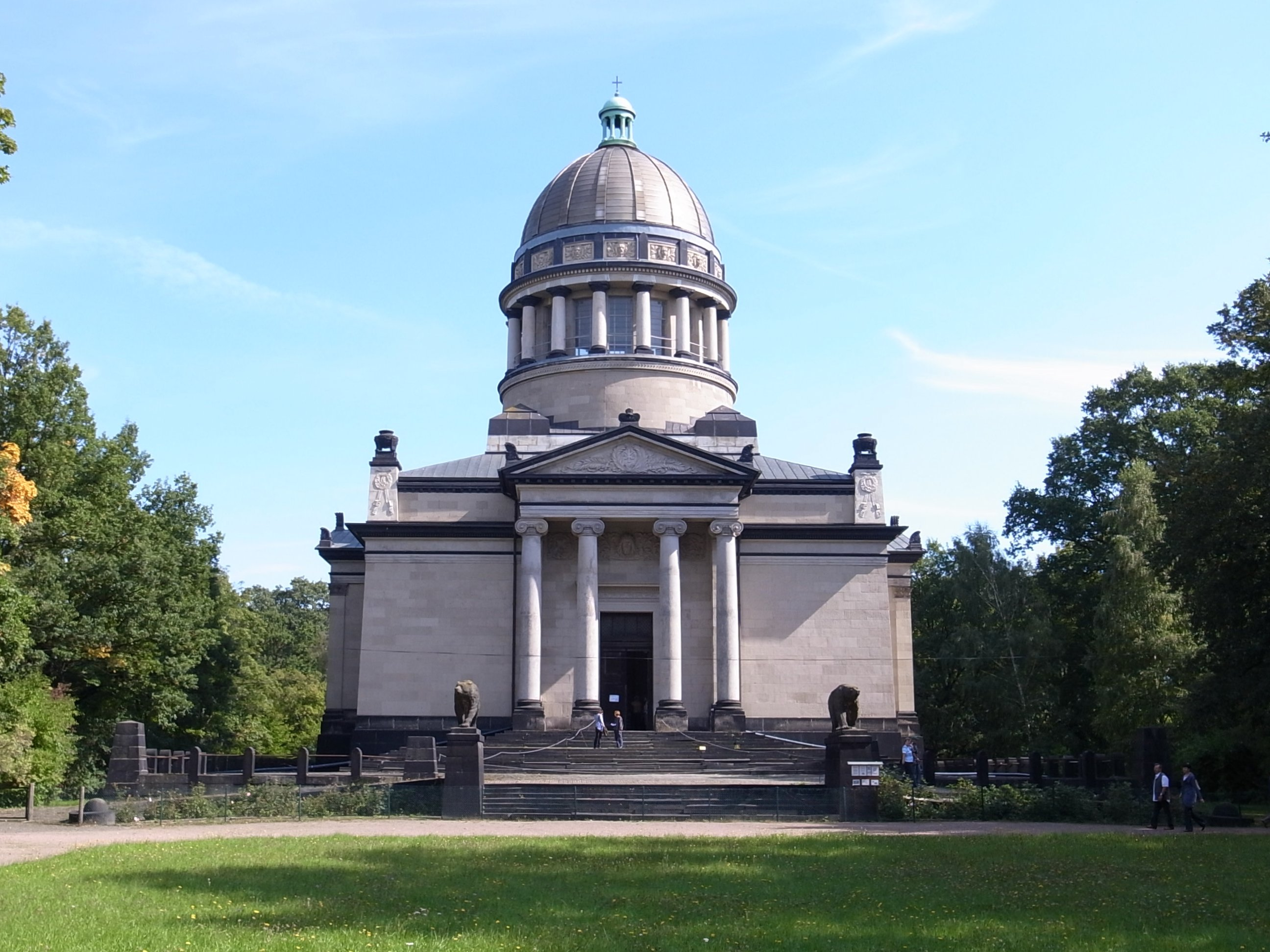 Mausoleum (Dessau), Tag des offenen Denkmals 2010